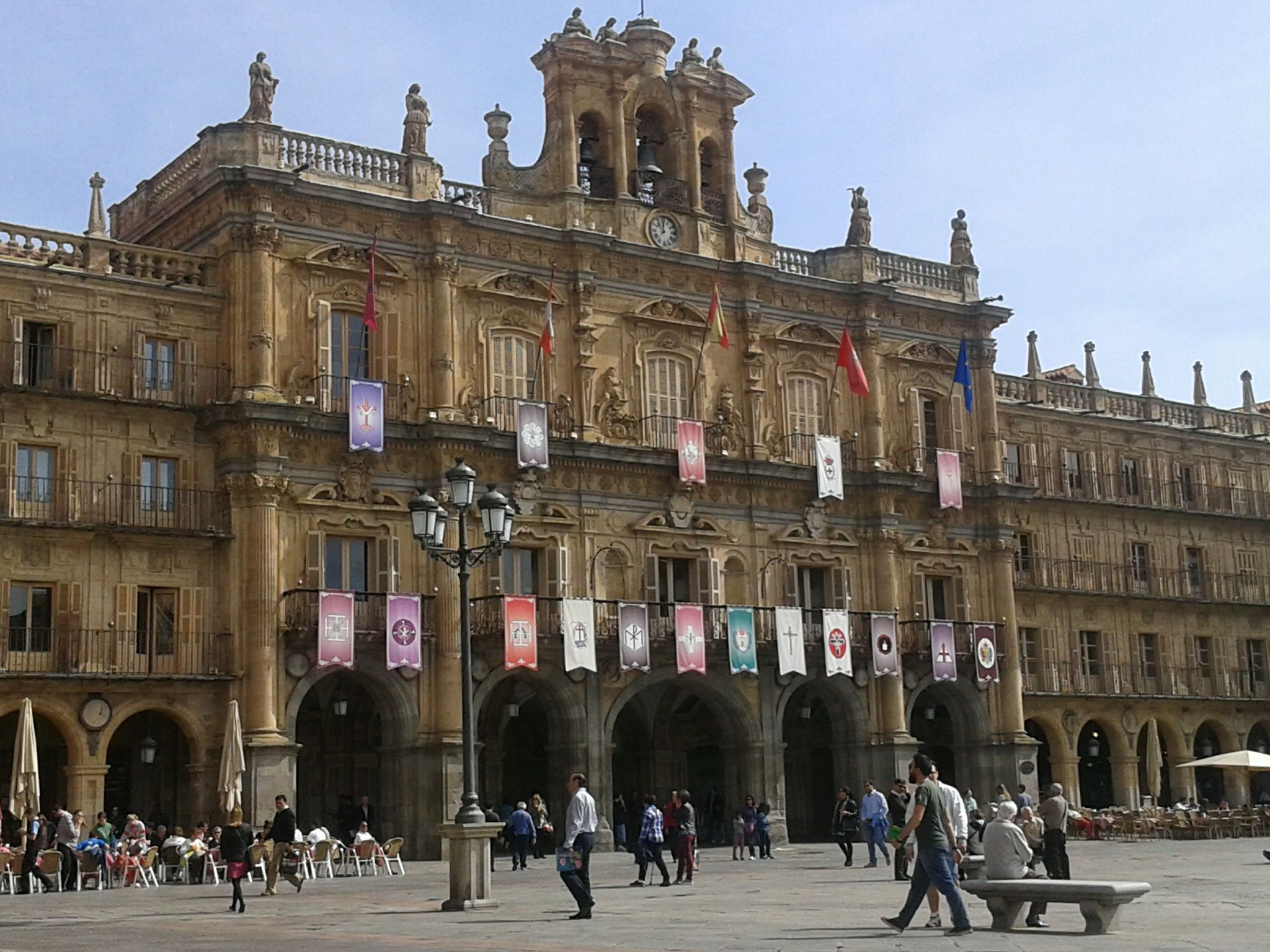 Salamanca. El ayuntamiento engalanado con los reposteros de las cofradías de Semana Santa.